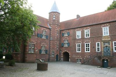 Die Haneburg in Leer, Ostfriesland (Niedersachsen). Foto: Temmo Bosse